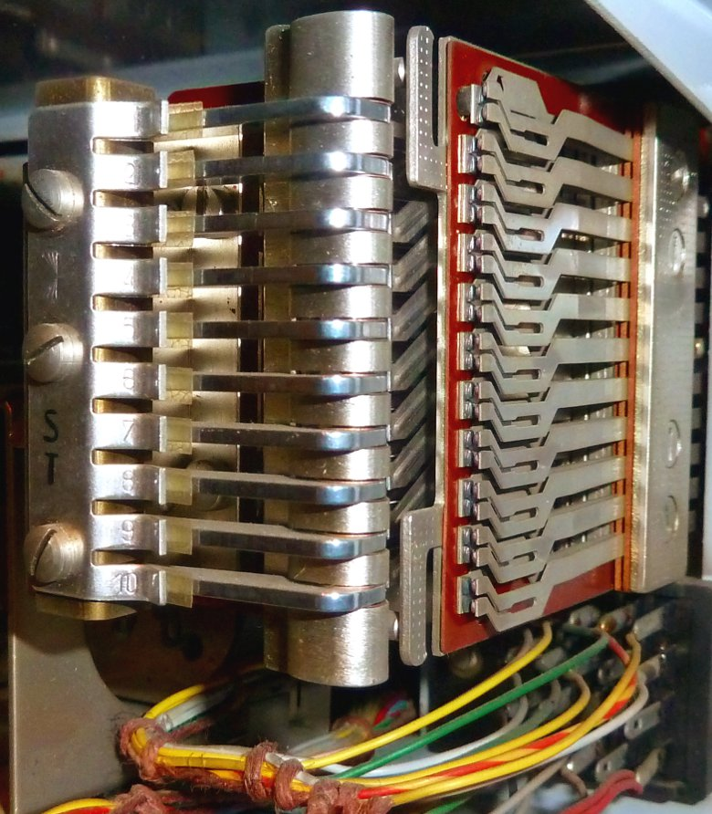 Zählmagnet für die Wählimpulse aus einer elektromechnischen Telefonanlage